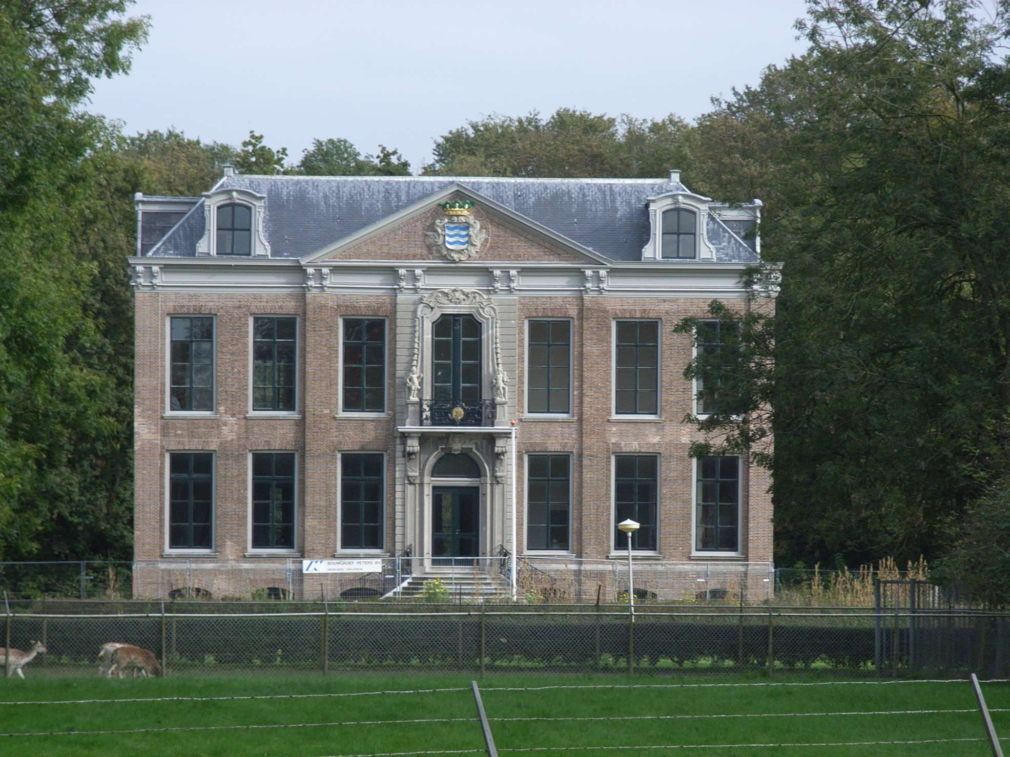 Buitenplaats Der Boede, Koudekerke, NL